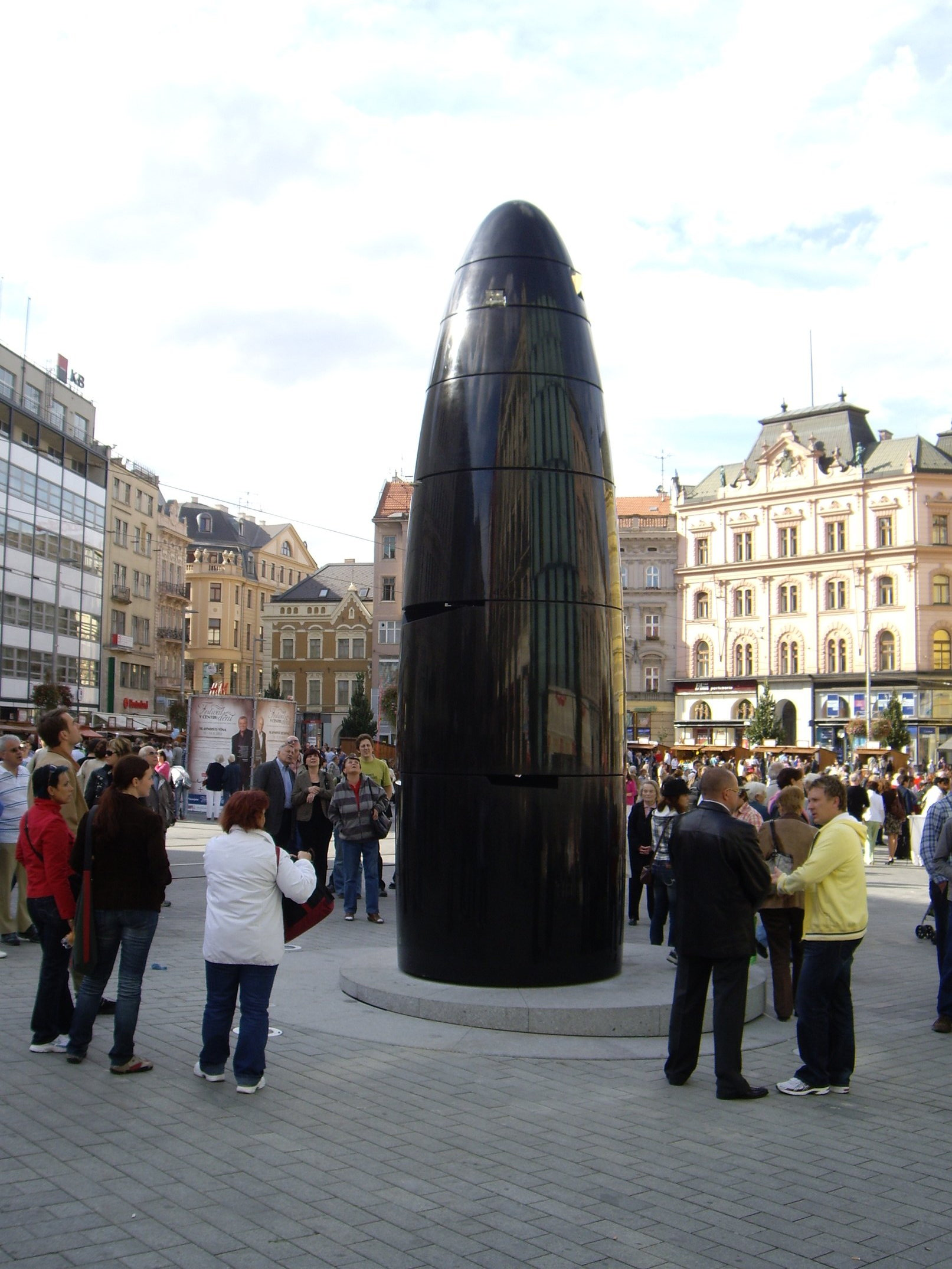 Nově postavené hodiny na náměstí Svobody v Brně.